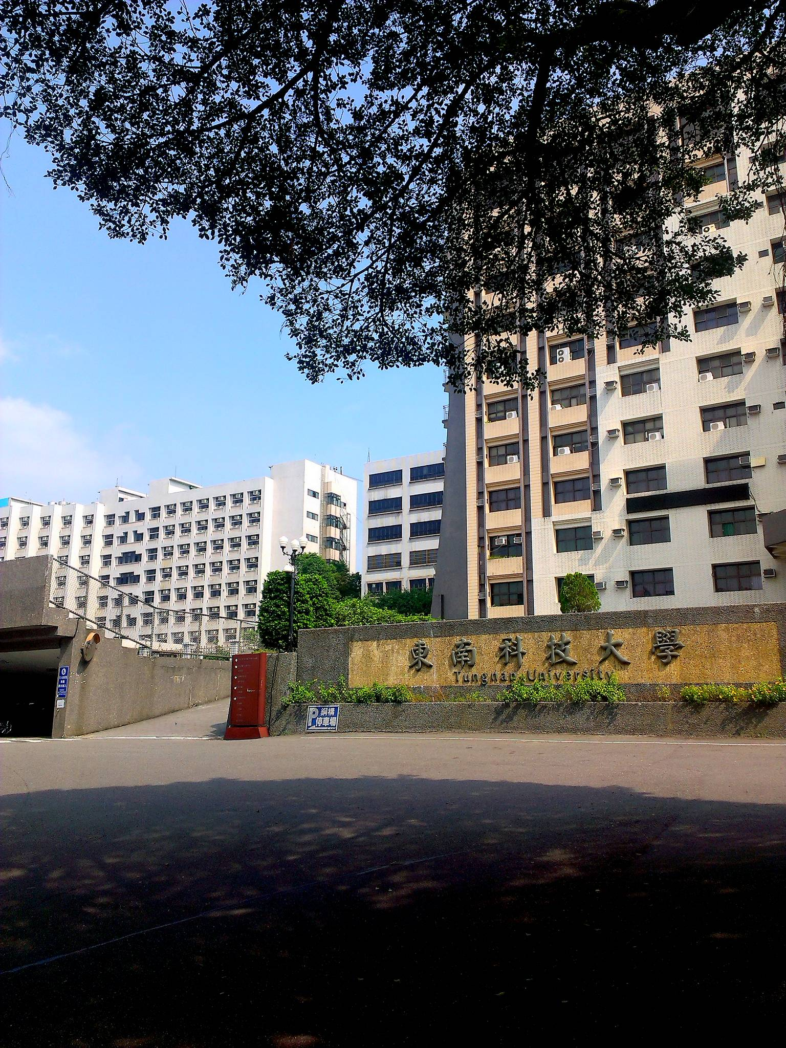 中文（台灣）: 東南科技大學校園學生廣場前